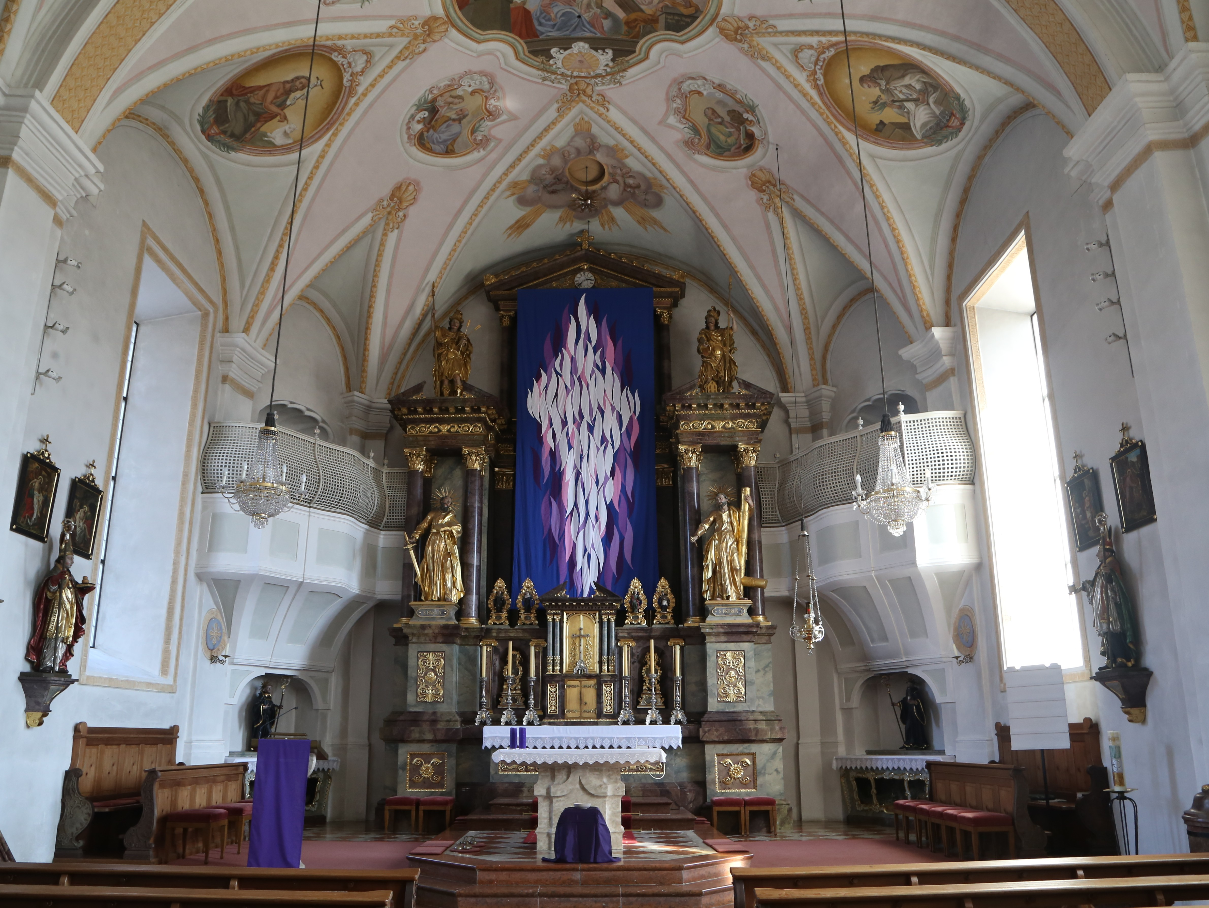 Kirchgasse, Niederndorf; Kath. Pfarrkirche hl. Georg und Friedhof This media shows the remarkable cultural object in the Austrian state of Tyrol listed by the Tyrolean Art Cadastre with the ID 3744. (on tirisMaps, pdf, more images on Commons, Wikidata)